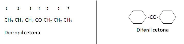 Cetona (quimica)